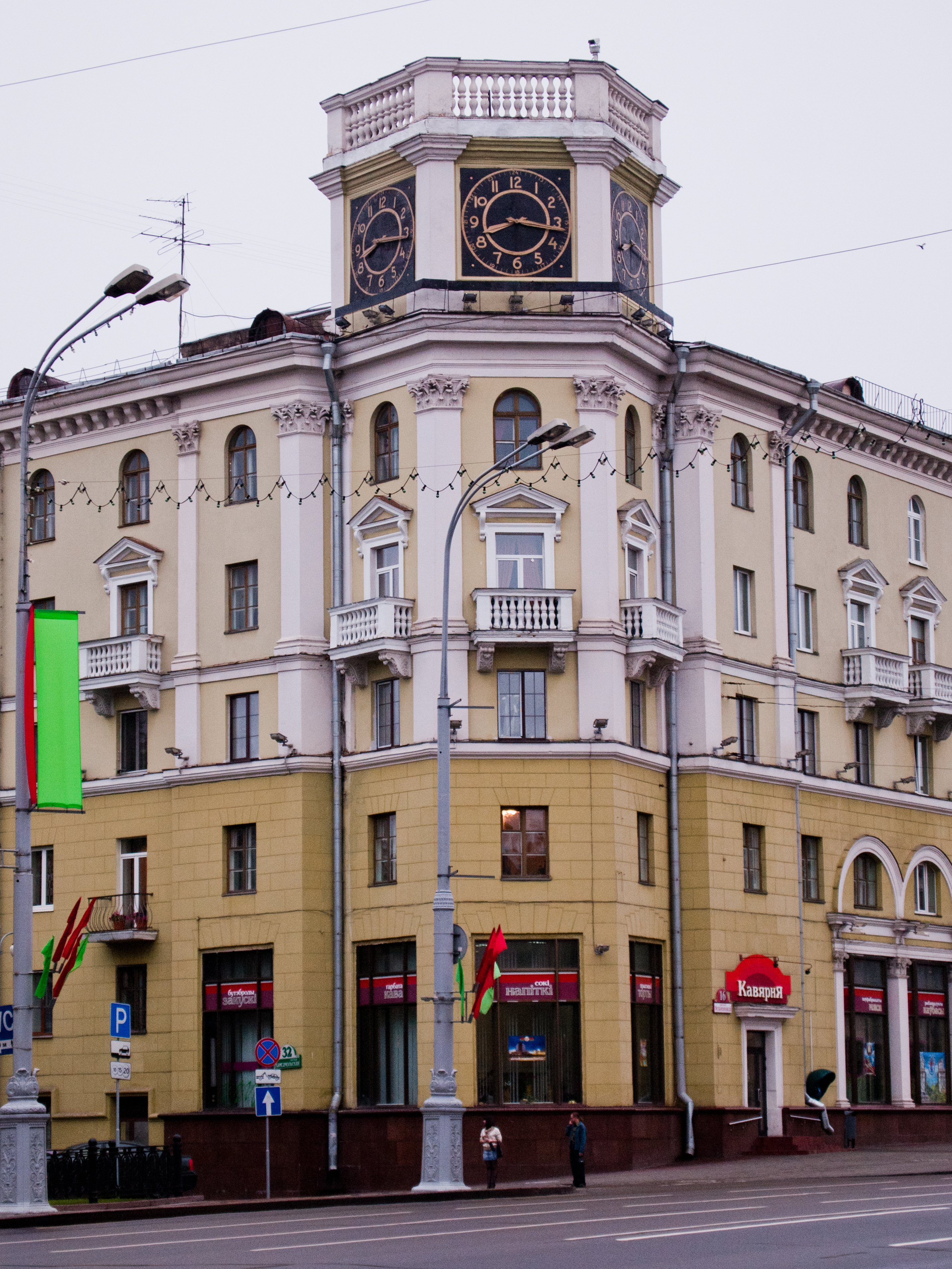 Minsk - Nahe Komsomolskaja und KGB